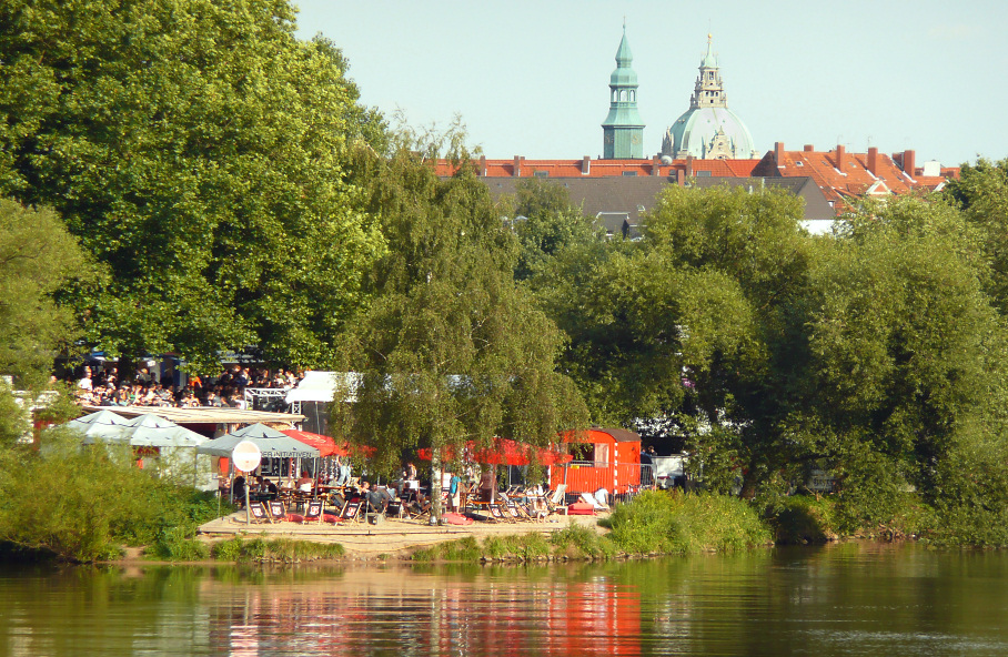 Fährmannsfest im eintrittspflichtigem Bereich mit Strand und Musikbühne